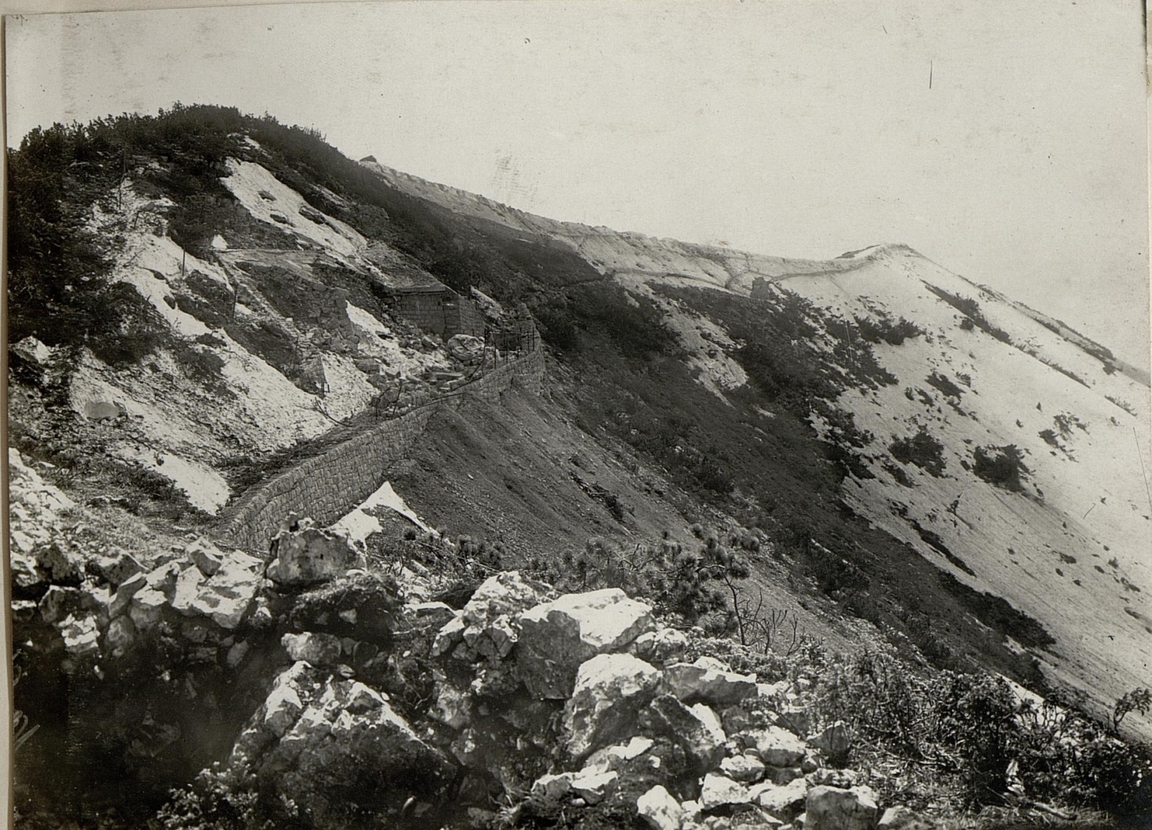 Monte Maggio. Gefechtsfeld. Aufgenommen am 22. Mai 1916.